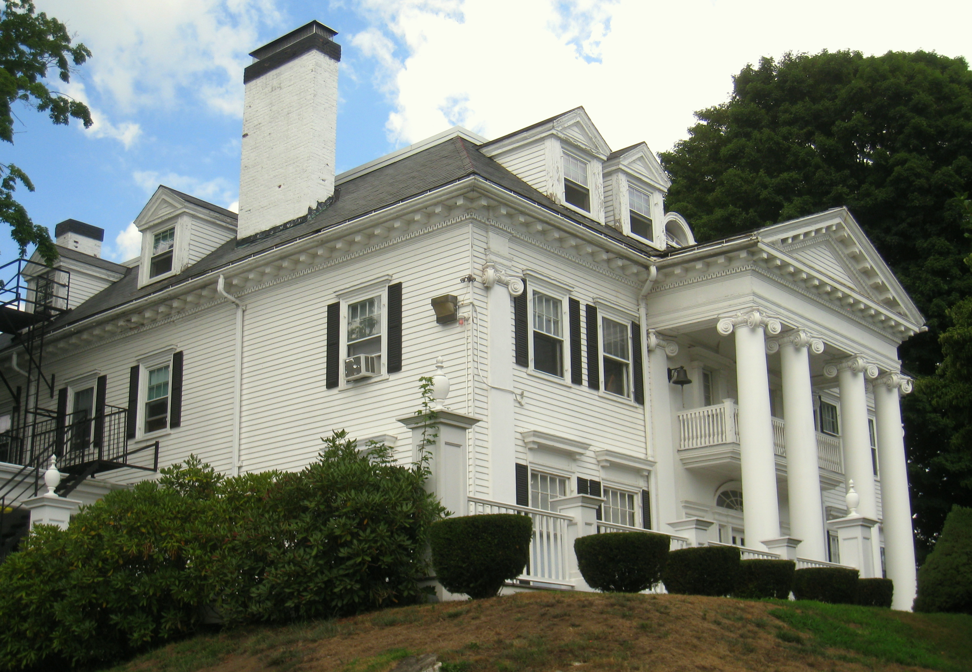 Admissions Building, Fessenden School, 250 Waltham Street, West Newton, Massachusetts, USA.